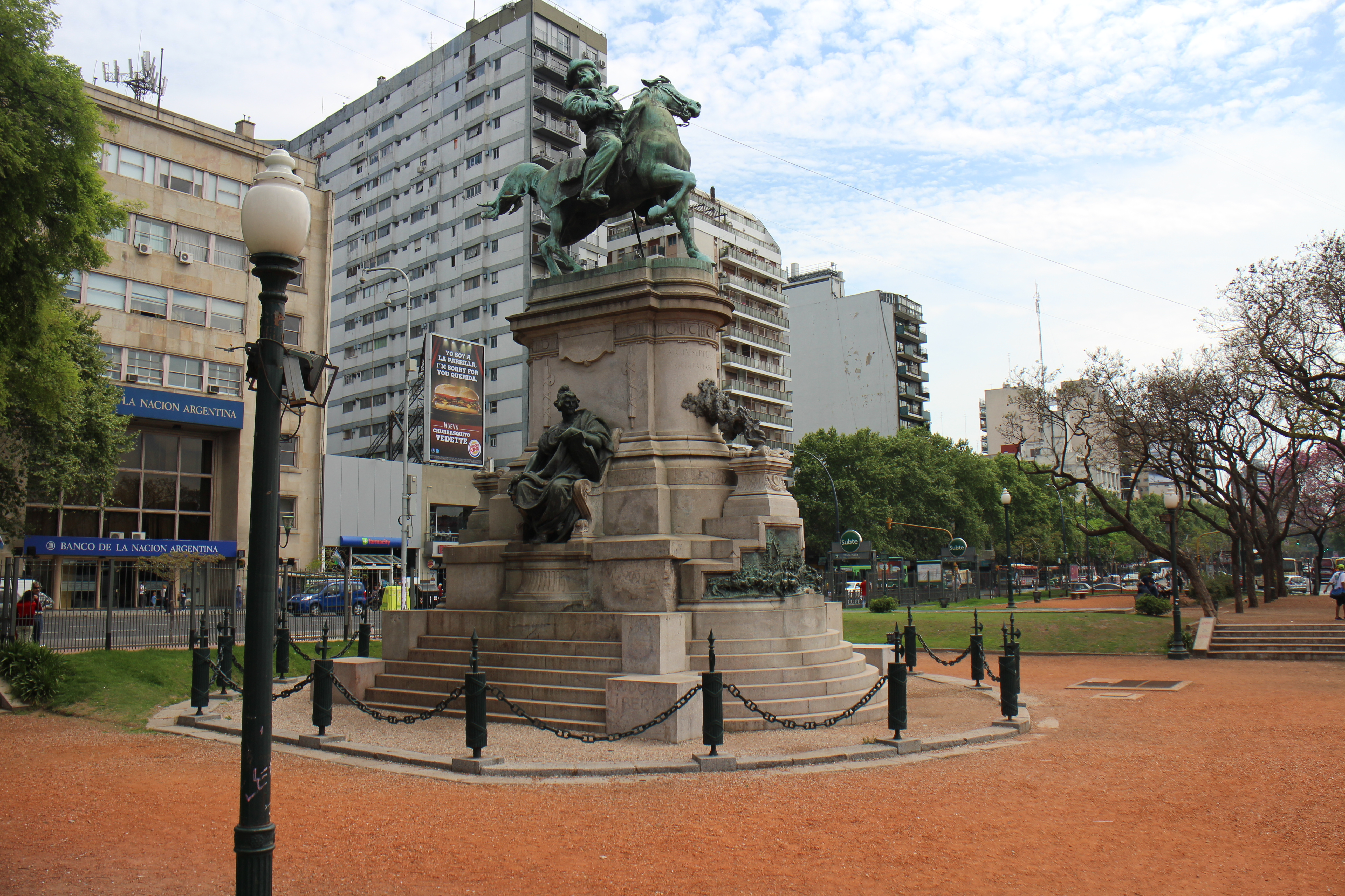 Plaza Italia, Palermo, Ciudad Autónoma de Buenos Aires.